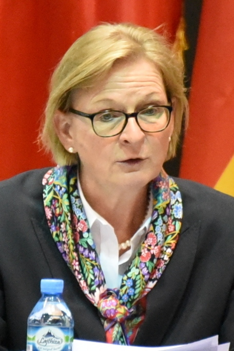 Susanne Schütz, Botschafterin der Bundesrepublik Deutschland in Albanien